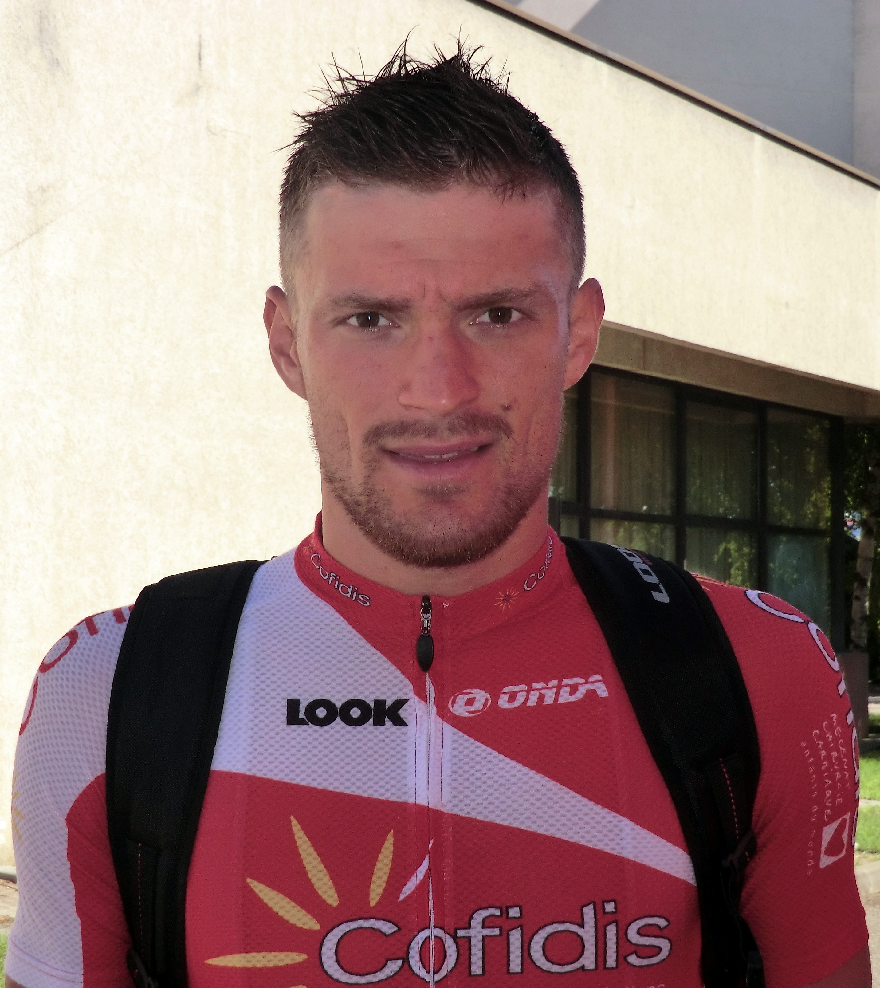 Départ de l'hôtel Lyon-Est de Saint-Maurice-de-Beynost de l'équipe Cofidis au matin de la seconde étape du Tour de l'Ain 2013.